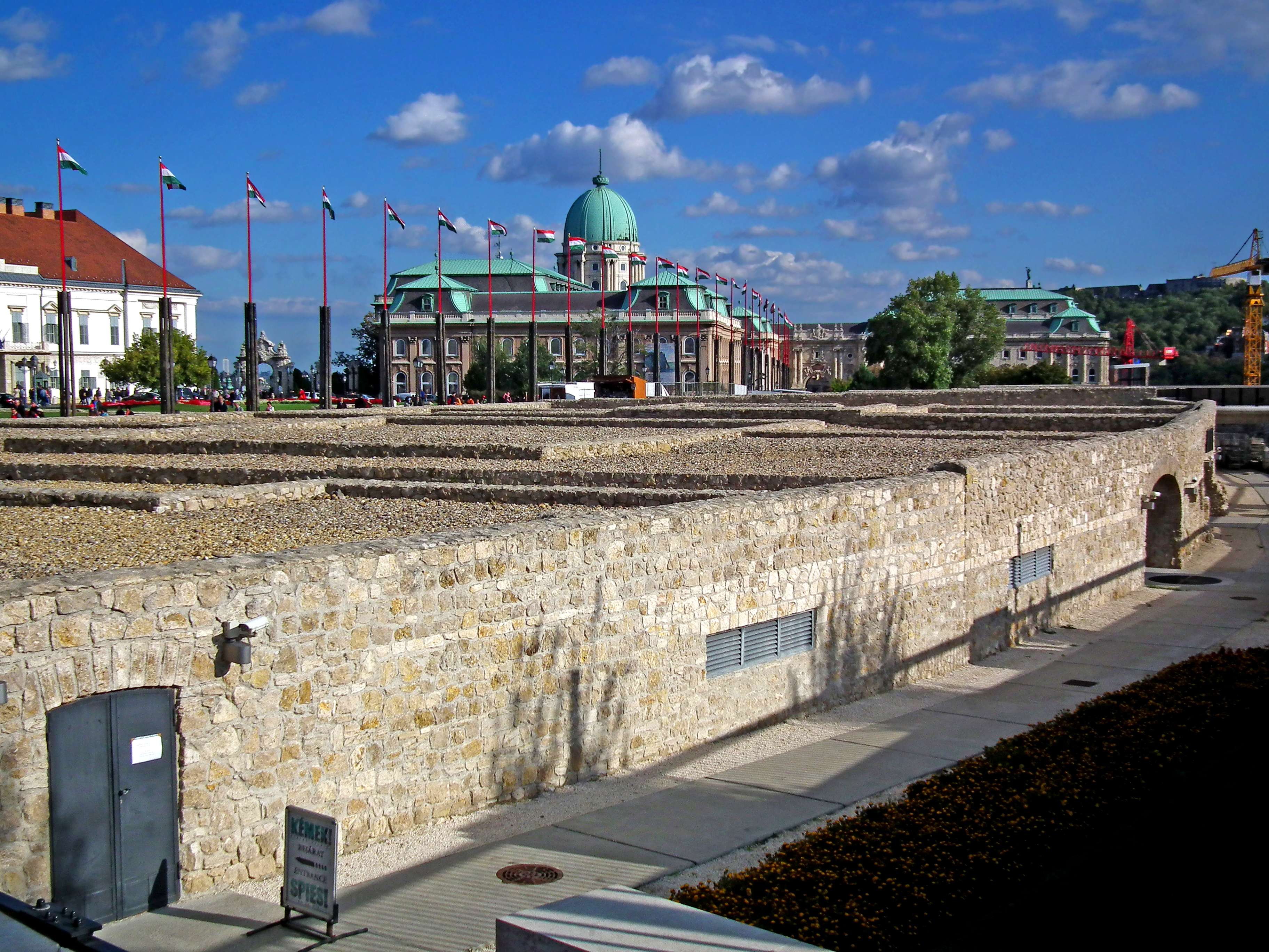 Teleki-palota és udvari istálló épületeinek maradványai, Budapest I. kerület, Szent György tér. A háttérben a kép bal szélén a Sándor-palota, középütt a Budavári Palota A és B épülete a C épület kupolájával, a kép jobb széle felé a fa mögött az F épület, s ennek hátterében a Gellért-hegyen álló Citadella látható This is a photo of a monument in Hungary. Identifier: 137 This is a photo of a monument in Hungary. Identifier: 138 This is a photo of a monument in Hungary. Identifier: 1119